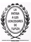 Escudo de Armas de la Ciudad de tupiza